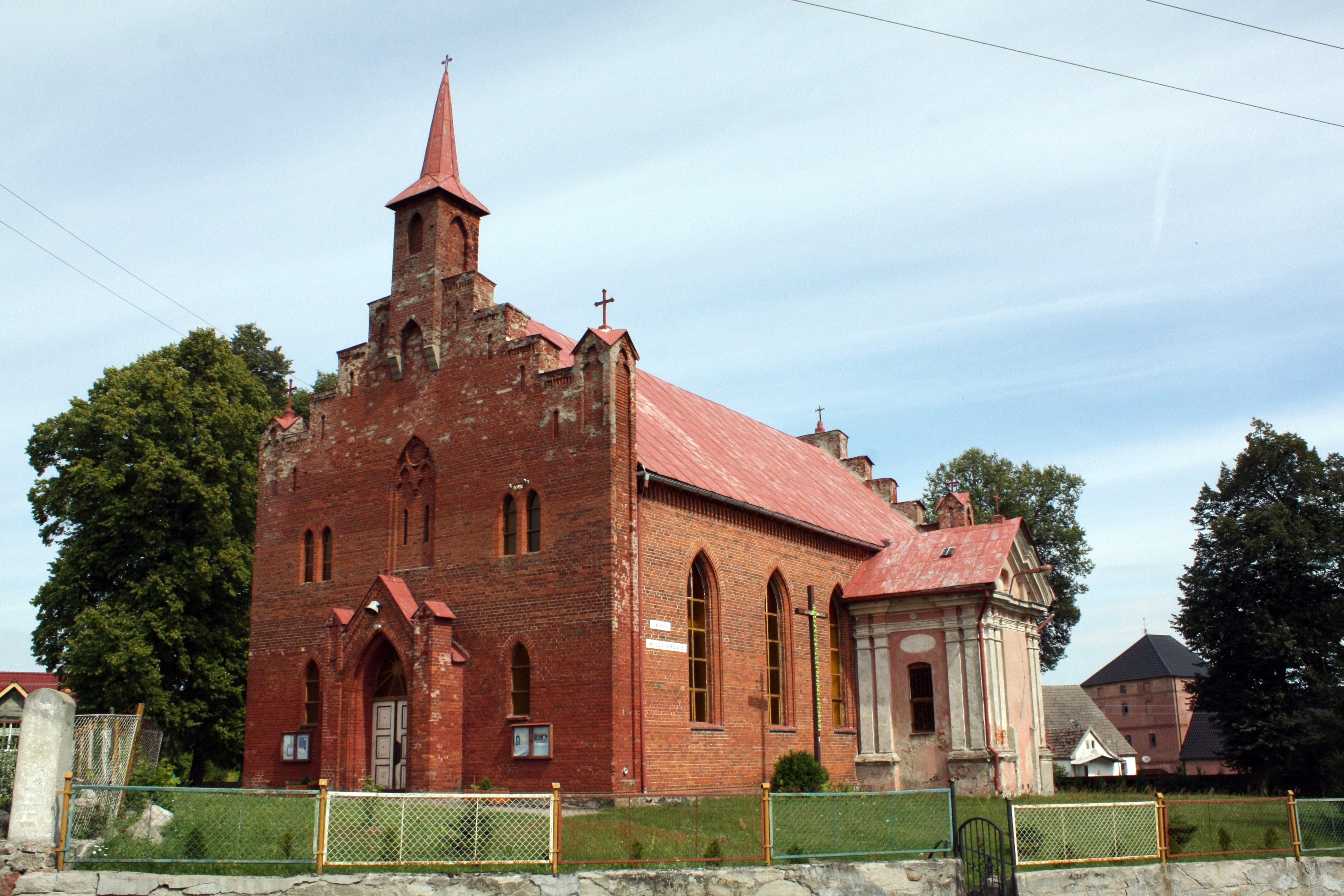 Siemczyno - zespół dawnego kościoła ewangelickiego, obecnie rzymskokatolickiego parafialnego pw. Matki Boskiej Różańcowej, 1854-1856